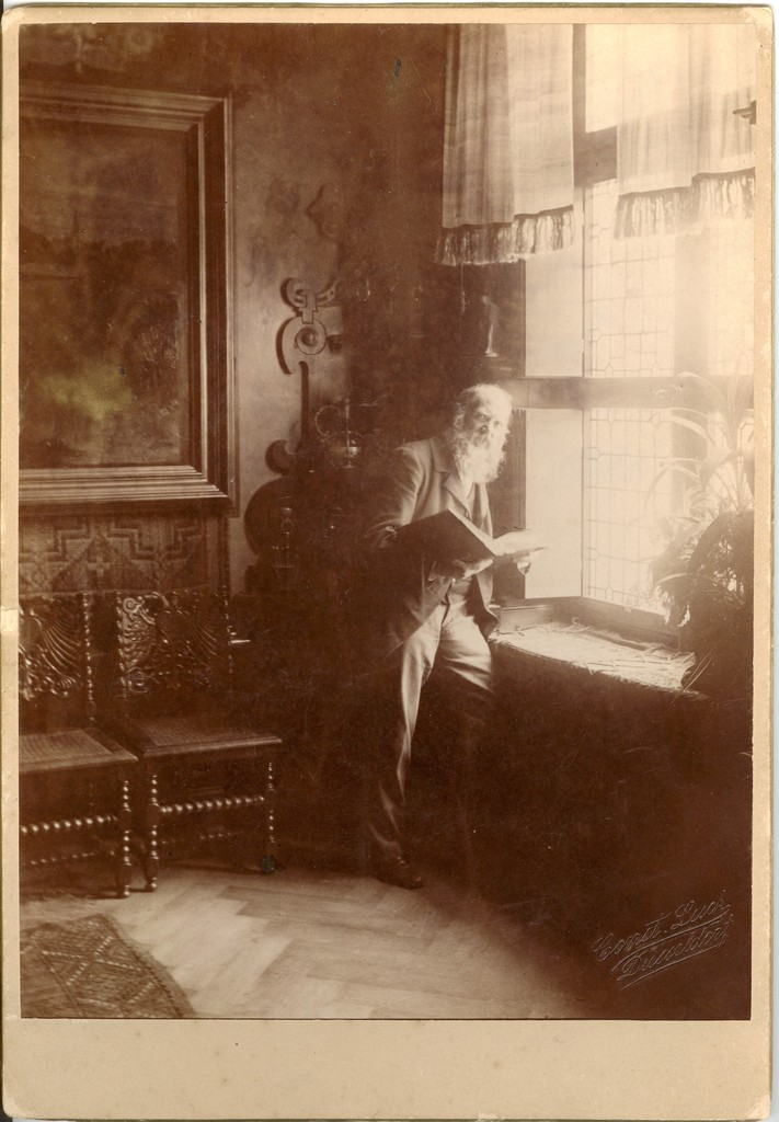 Muuseumikogu Fotokogu Olemus foto Originaal originaal Kollektsioon Järvamaa Muinasasjade Alalhoidmise Selts Säilivus hea Eraldatavad osad Tehnika must-valge foto Materjal fotopaber Värvus pruun Mõõdud foto formaat: 1 18 x 24 cm tempel/ etikett/ märk Const.Luck Düsseldorf füüsiline kirjeldus pruuni koloriidiga foto kleebitud papist alusele sisu kirjeldus Fotoportree. Järva-Jaanist pärit maalikunstnik Eduard von Gebhardt 19.saj. lõpus. Seisab akna juures, raamat käes. toetub vastu seina. Seljas ülikond, habemega. Fotol jäänud ka osa toa sisustust - toalill, seinamaal, toolid.